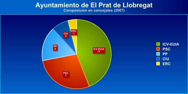 Composición del Ayuntamiento de El Prat